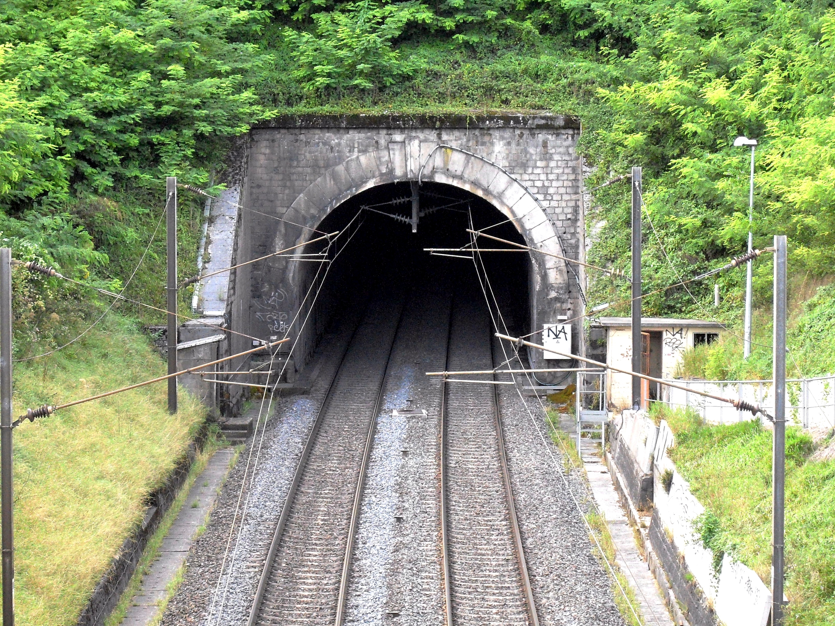 Foug Tunnel du chemin de fer. On trouve entre Lay-Saint-Remy et Foug, deux tunnels parallèles, l'un pour la voie de chemin de fer et l'autre pour le canal, qui tous deux coupent à travers l'un des méandres de l'ancien lit de la Moselle, évitant ainsi un long détour par la ferme de Savonnières.